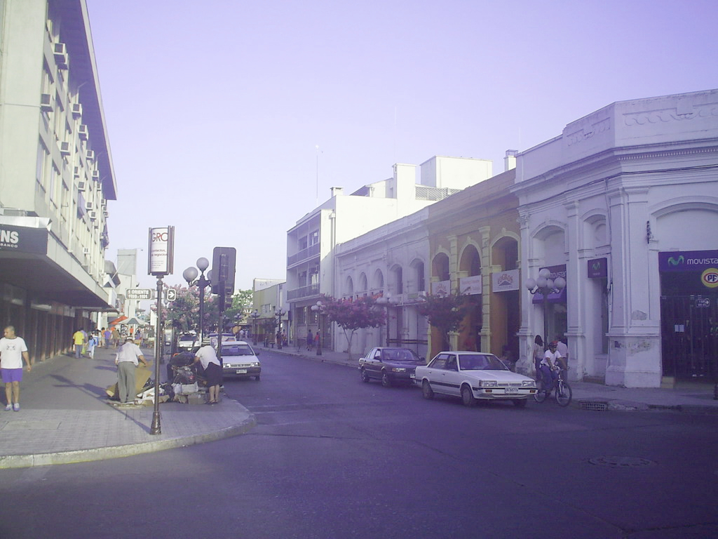 Calle 1 Sur de Talca. Calle principal del sector comercial de la ciudad. Ubicación 1 Sur con 1 Oriente.